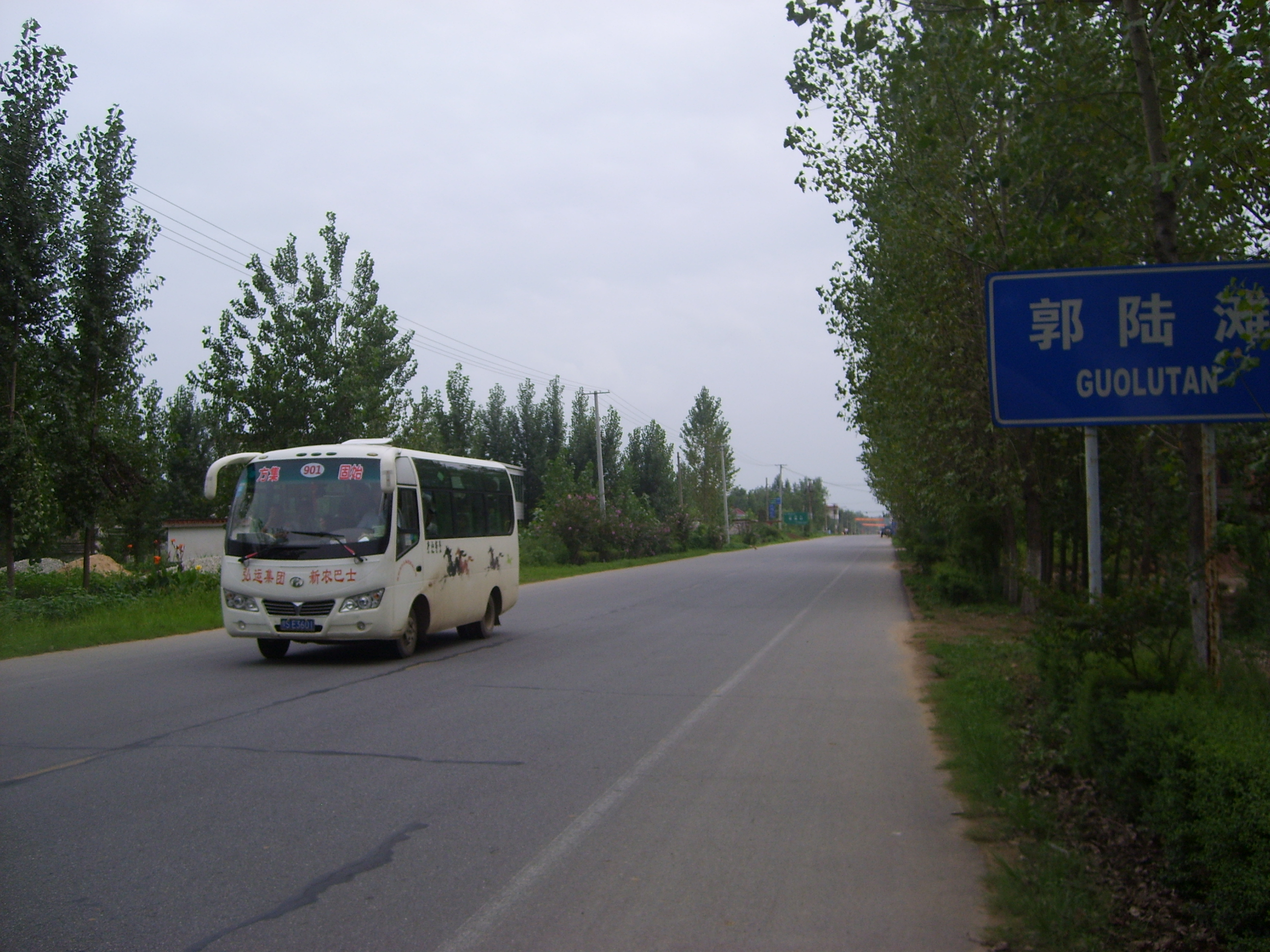 中文（中国大陆）: 行进在204省道上的一辆固始县城乡公交车